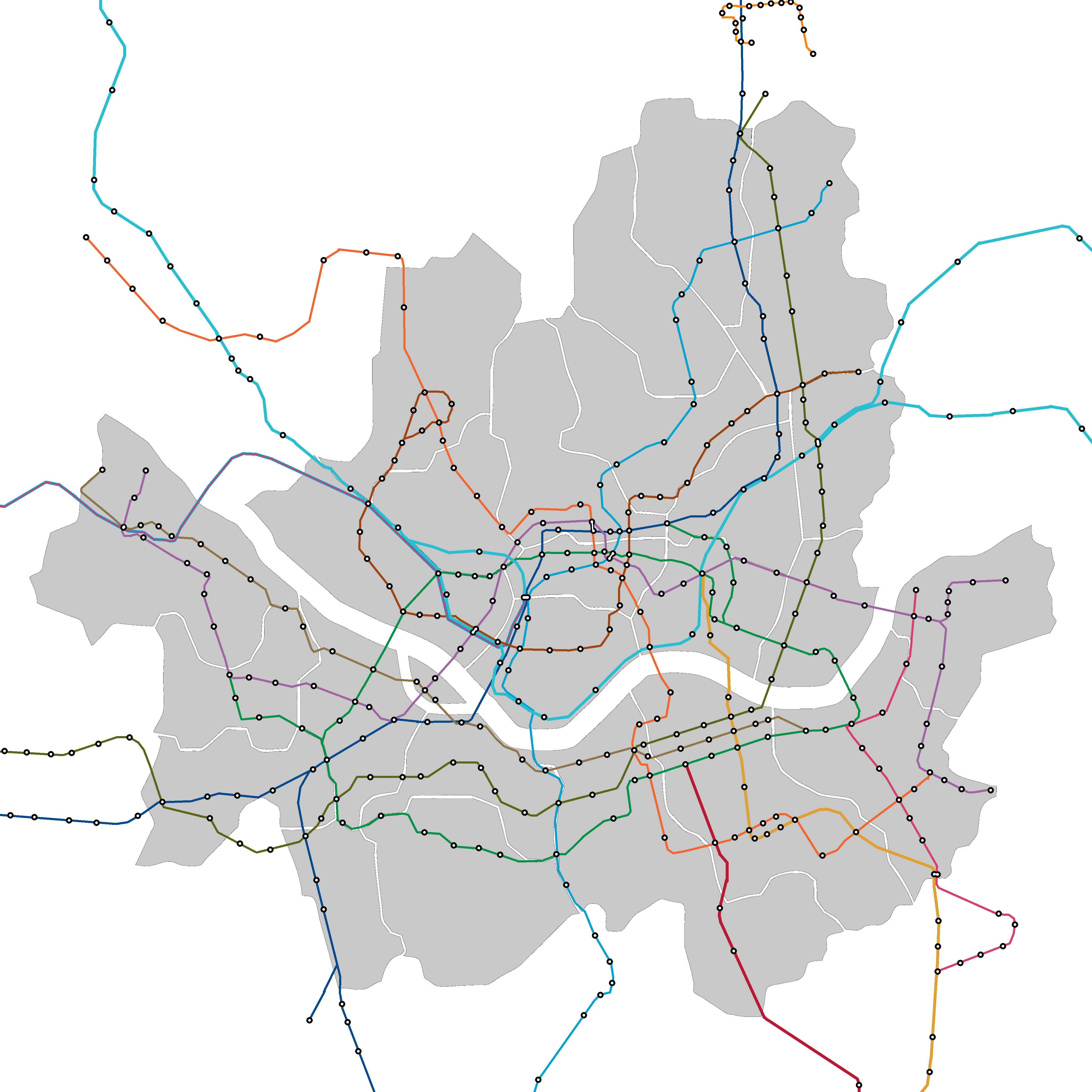 نقشه خطوط مترو شهر سئول بر روی مناطق شهرداری شهر سئول